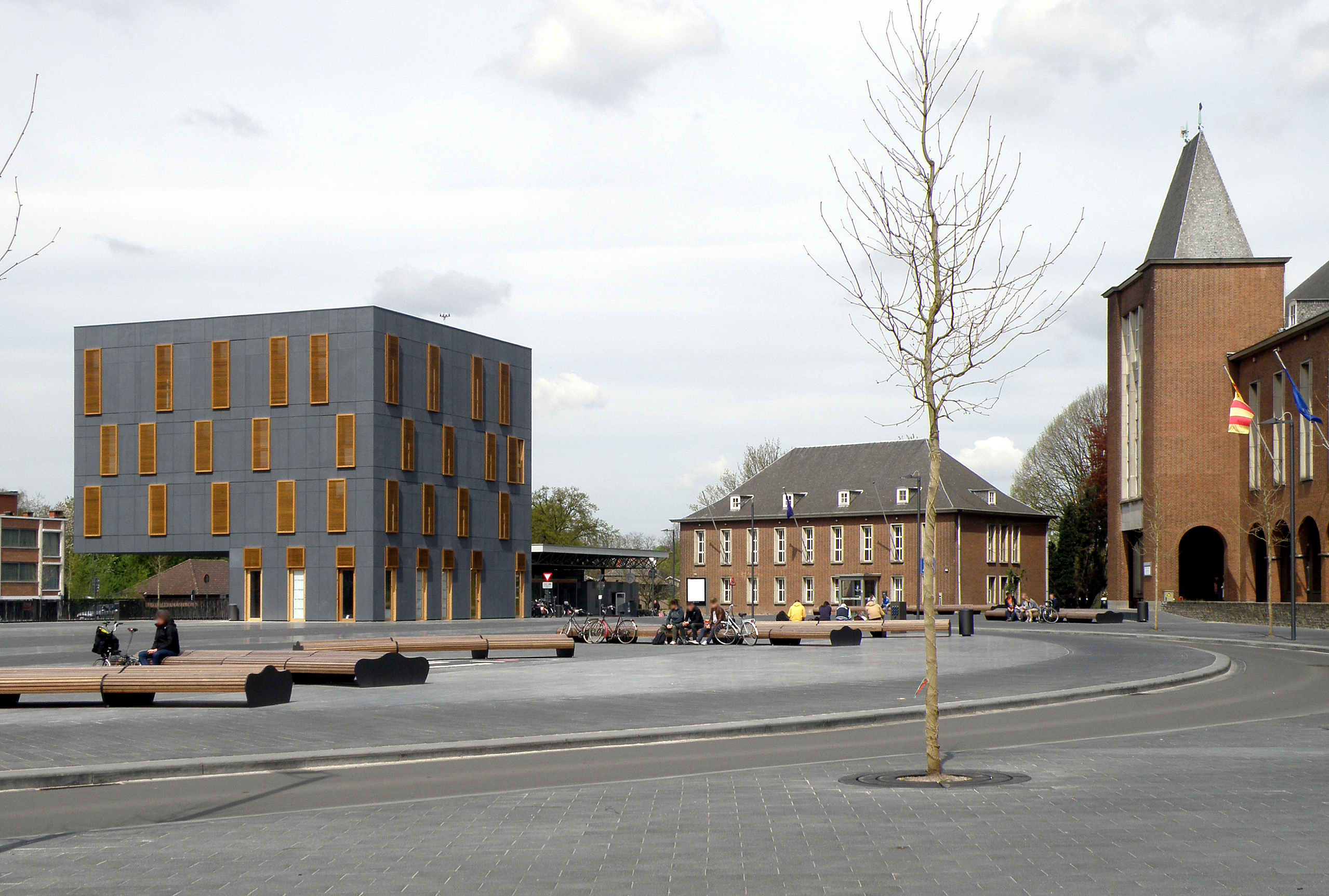 Mortsel bij Antwerpen. Het heraangelegde Stadsplein, april 2013.